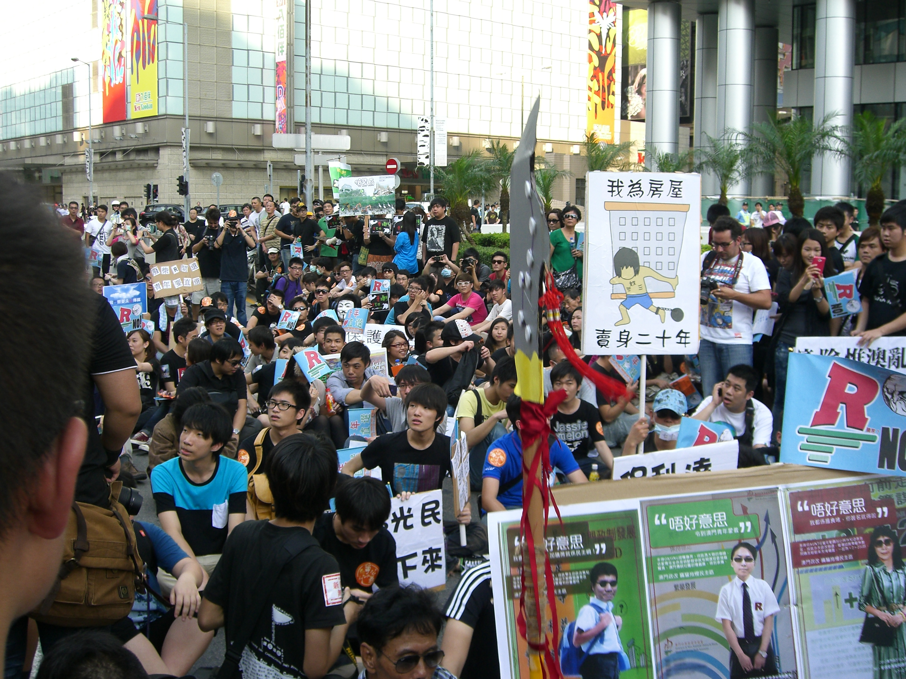 2012年澳門勞動節遊行